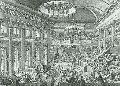 De Opening van de Nationale Vergadering in Den Haag 1 Maart 1796 onder voorzitterschap van P. Paulus